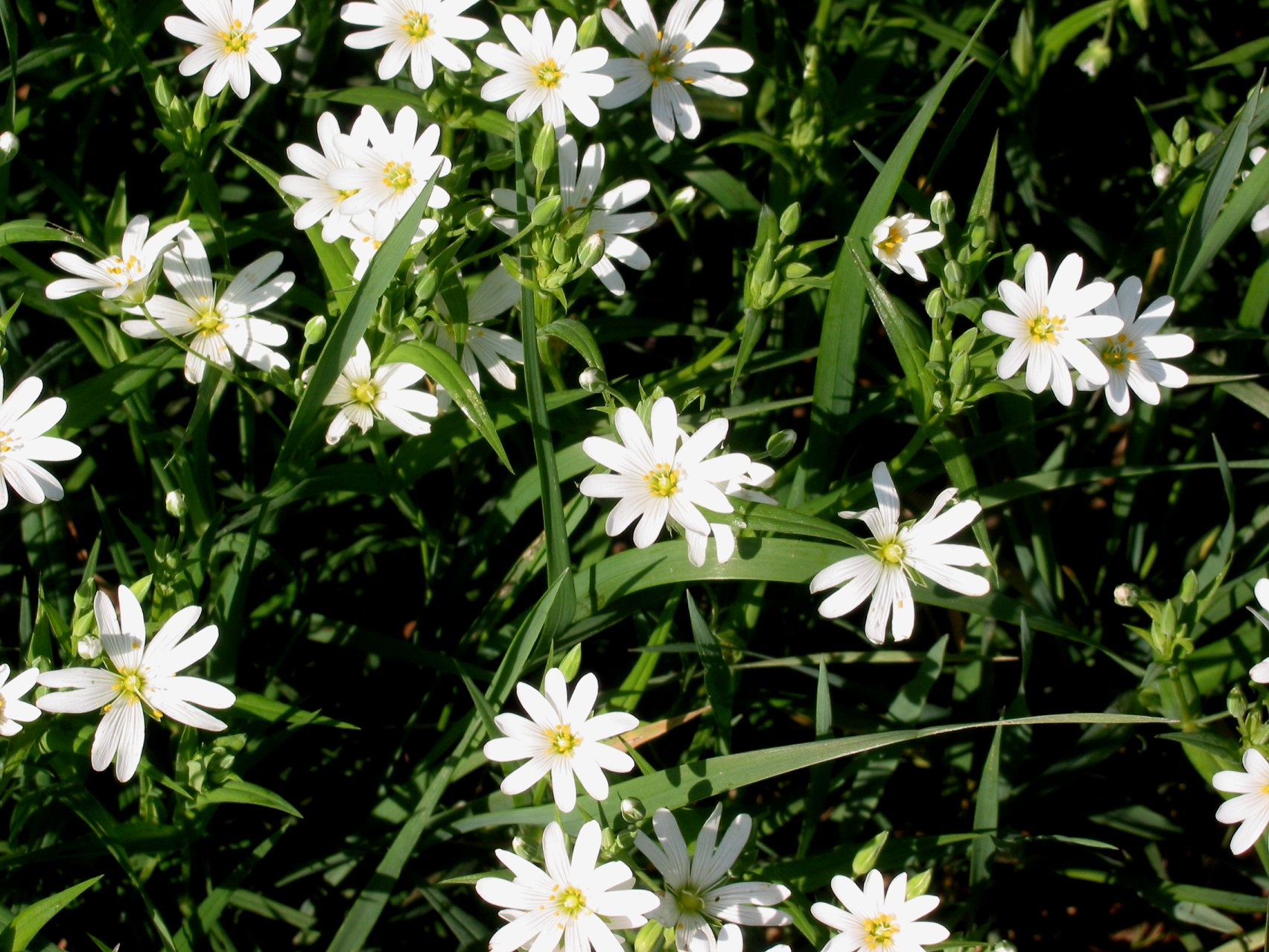 Stellaria holostea (Grote muur)